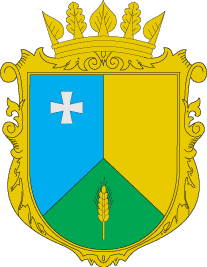 Герб Славутського району